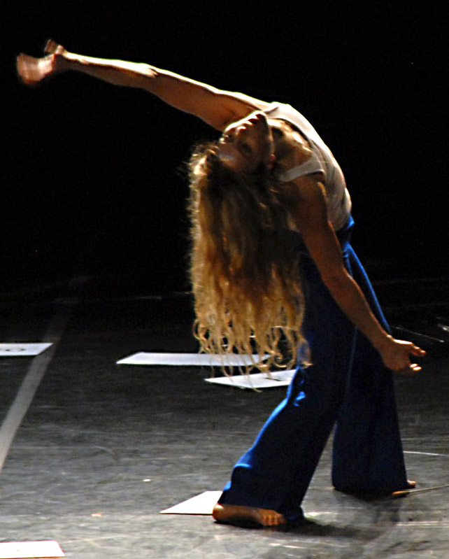 Louise Lecavalier in "Fou glorieux" Quebec, Canada